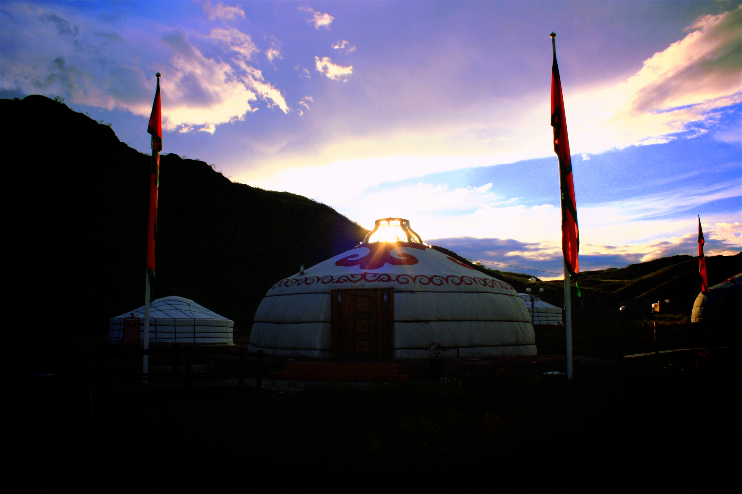 Этнокультурный комплекс "Алдын Булак"